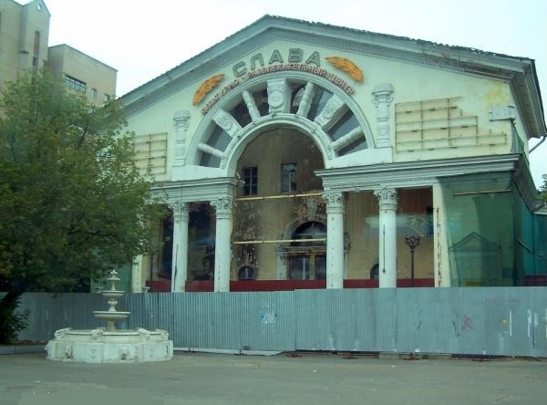 Кинотеатр Слава в Москве.